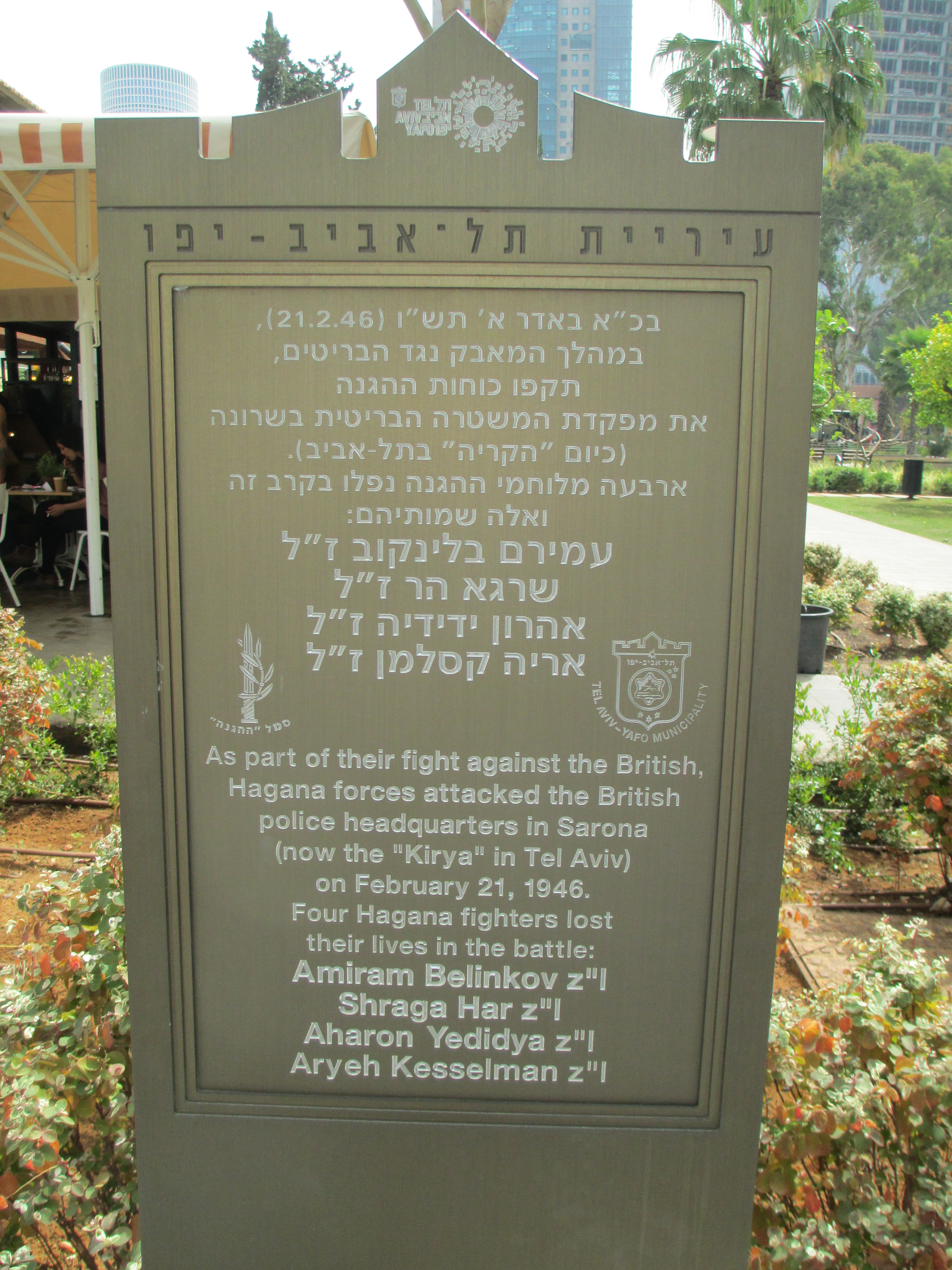 שלט זיכרון לארבעת הנופלים בהתקפה על שרונה ב21/2/46. נמצא ברחוב אוסוואלדו ארניה במתחם שרונה